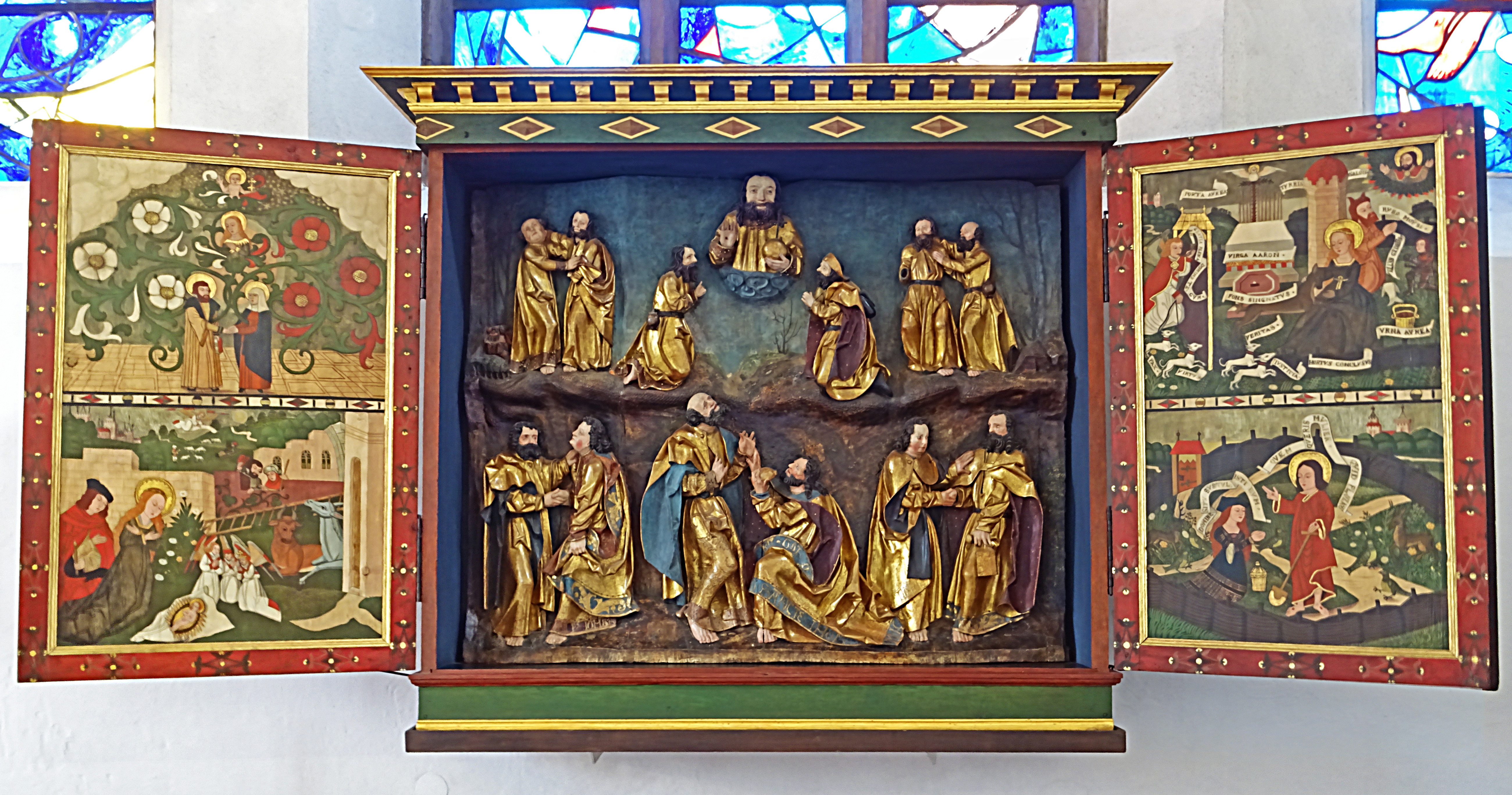 Apostelaltar (um 1520) in der Ursulinen-Klosterkirche Erfurt. Das Relief in der Mitte zeigt die Himmelfahrt Christi und die Aussendung der Jünger.